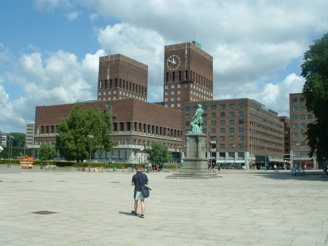 Het Raadhuis van Oslo (eigen foto)